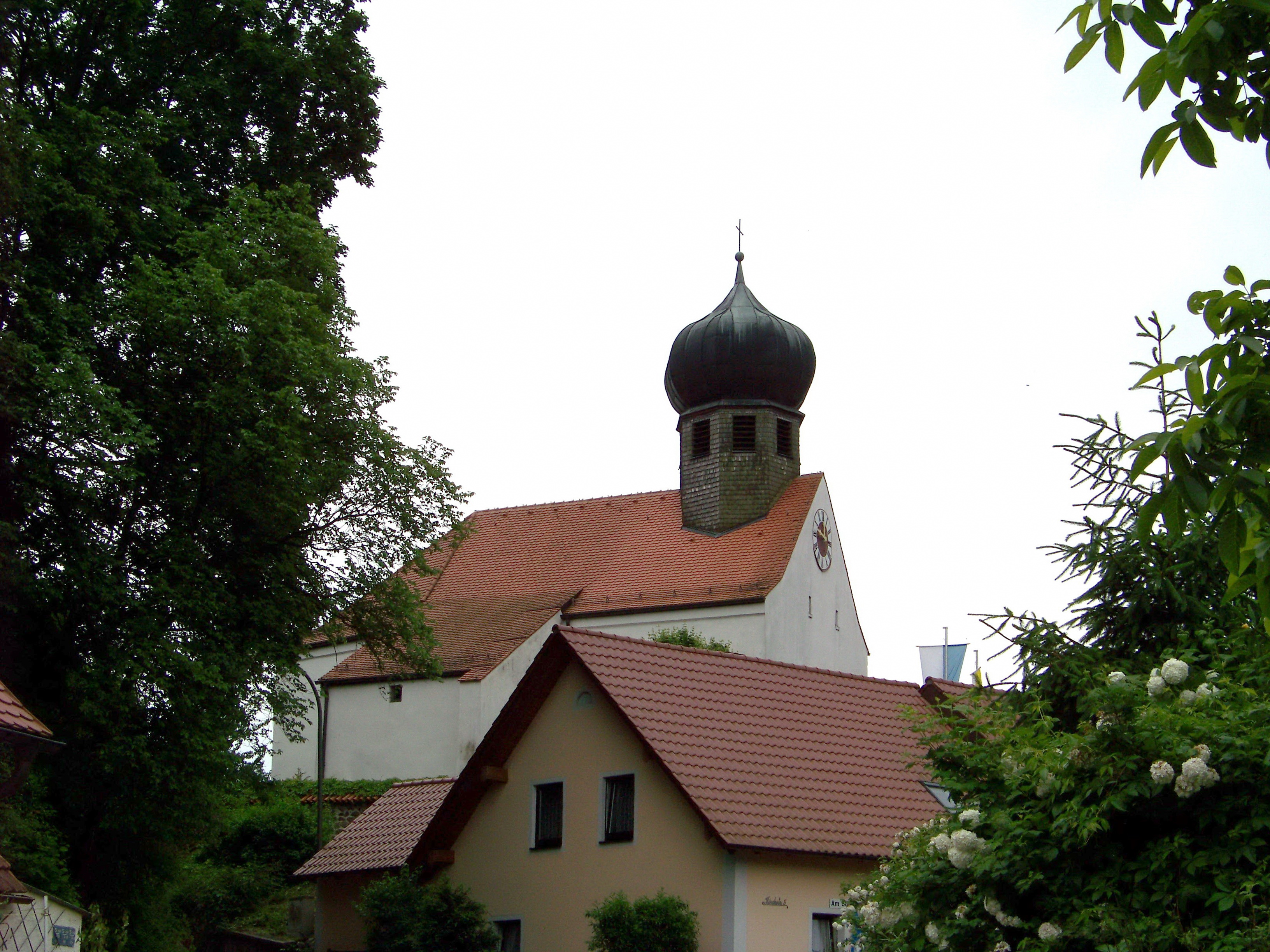 Donaustauf, Sulzbach, Kirchstraße 7.Katholische Filialkirche St. Martin, ehem. Wehrkirche, Saalbau mit abgewalmtem Satteldach und verschindeltem Dachreiter mit Zwiebelhaube, frühgotisch, barock verändert; Friedhofsmauer aus Granitbruchstein, spätgotisch.